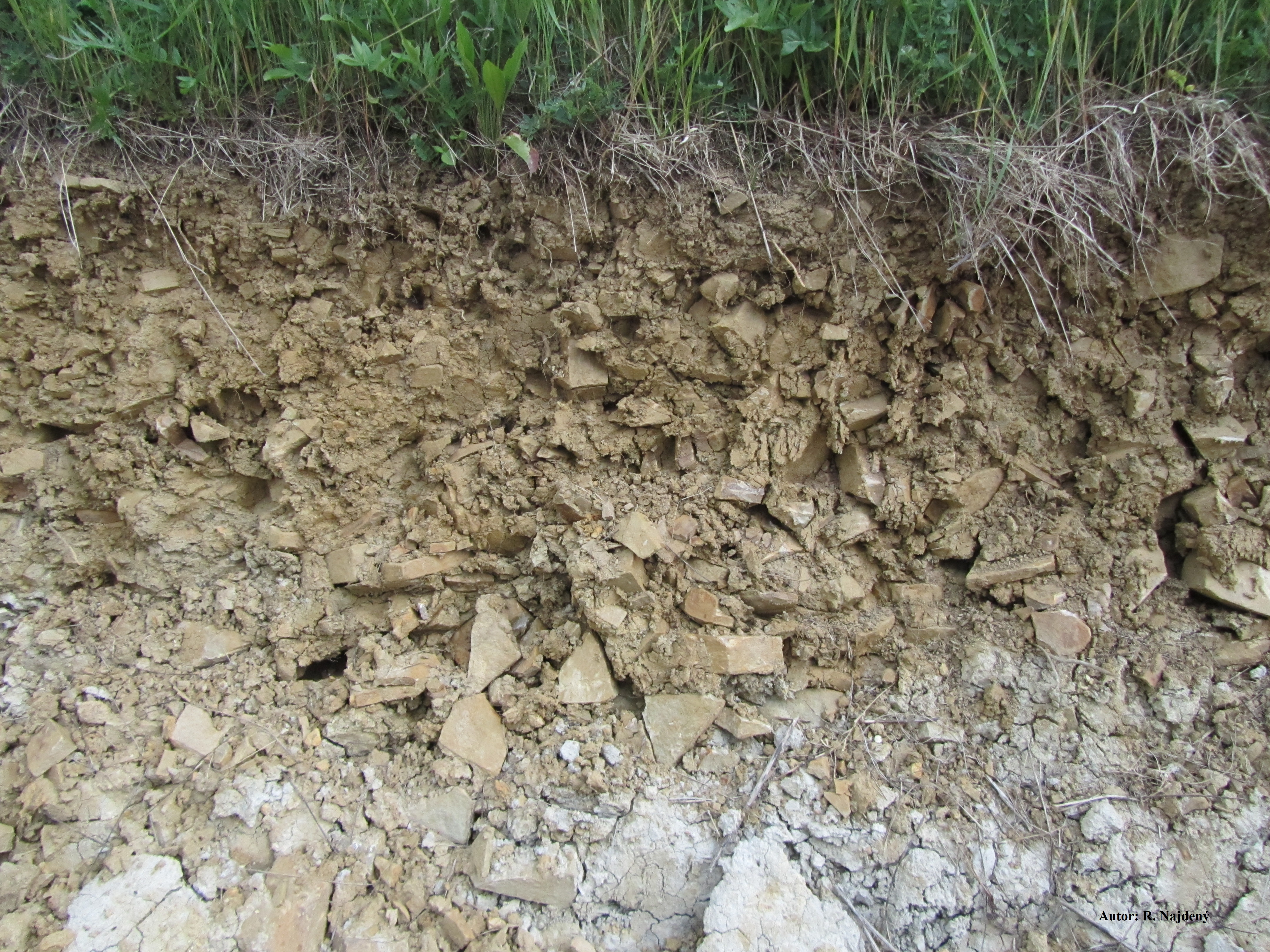 Kambizeme v Novej Bošáci